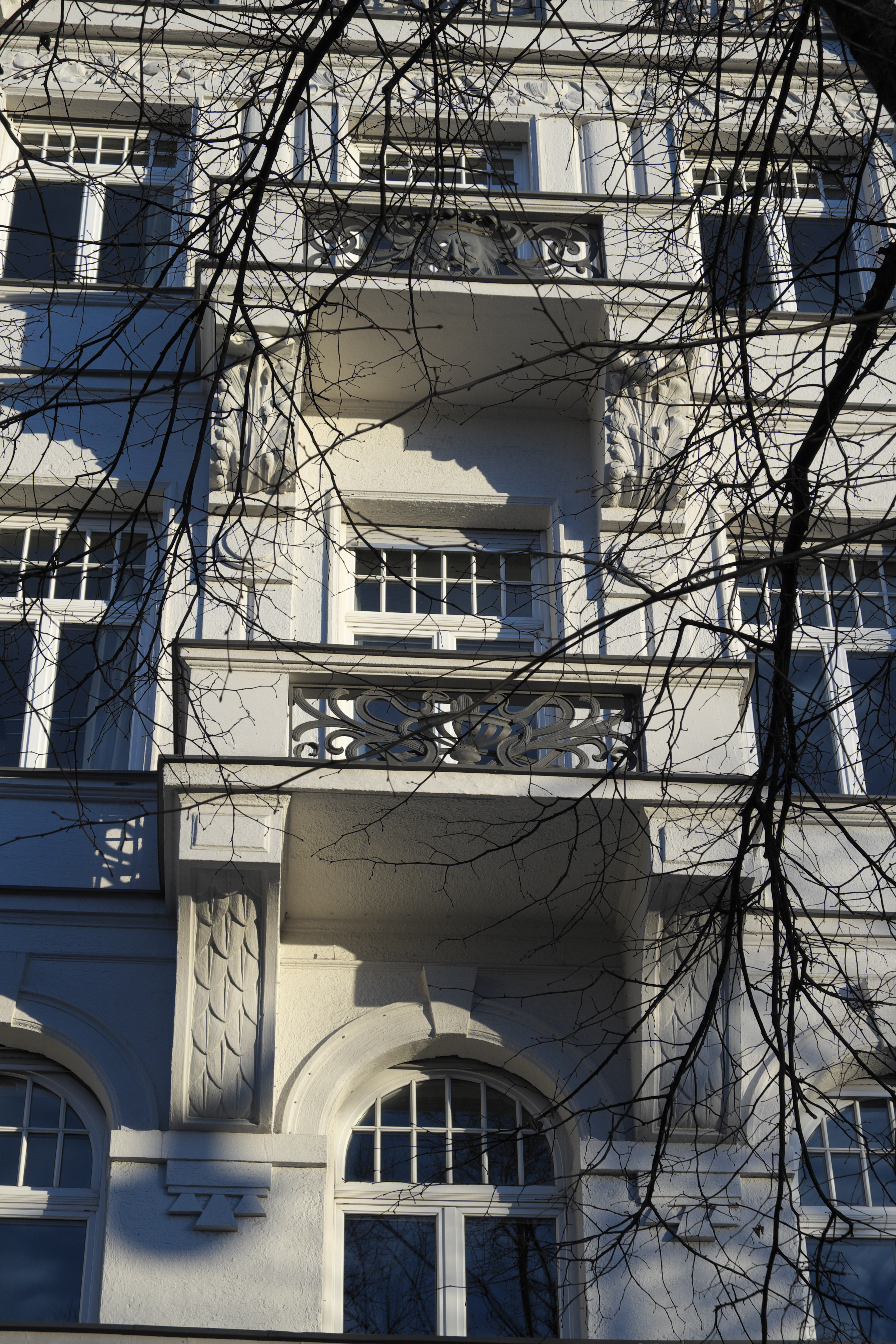 Mietshaus am Prinzregentenplatz 21/23 im Stadtbezirk Bogenhausen in München (Bayern/Deutschland), Nr. 21 1901 von Hans Hartl, Nr. 23 um 1900 wohl von Carl Vent erbaut